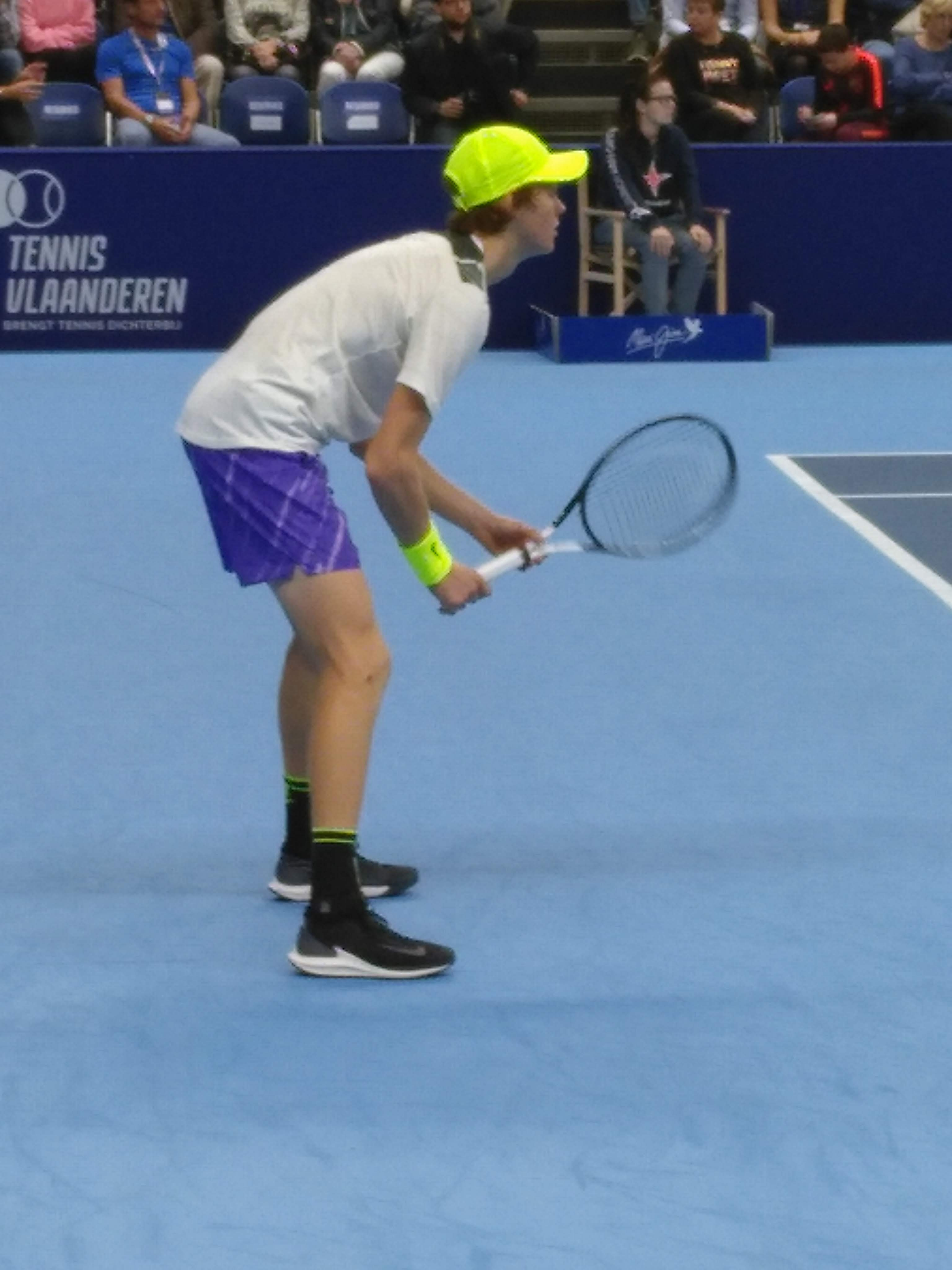 De Italiaanse tennisser Jannik Sinner tijdens zijn halve finale tegen Stan Wawrinka op de European Open Antwerp 2019.